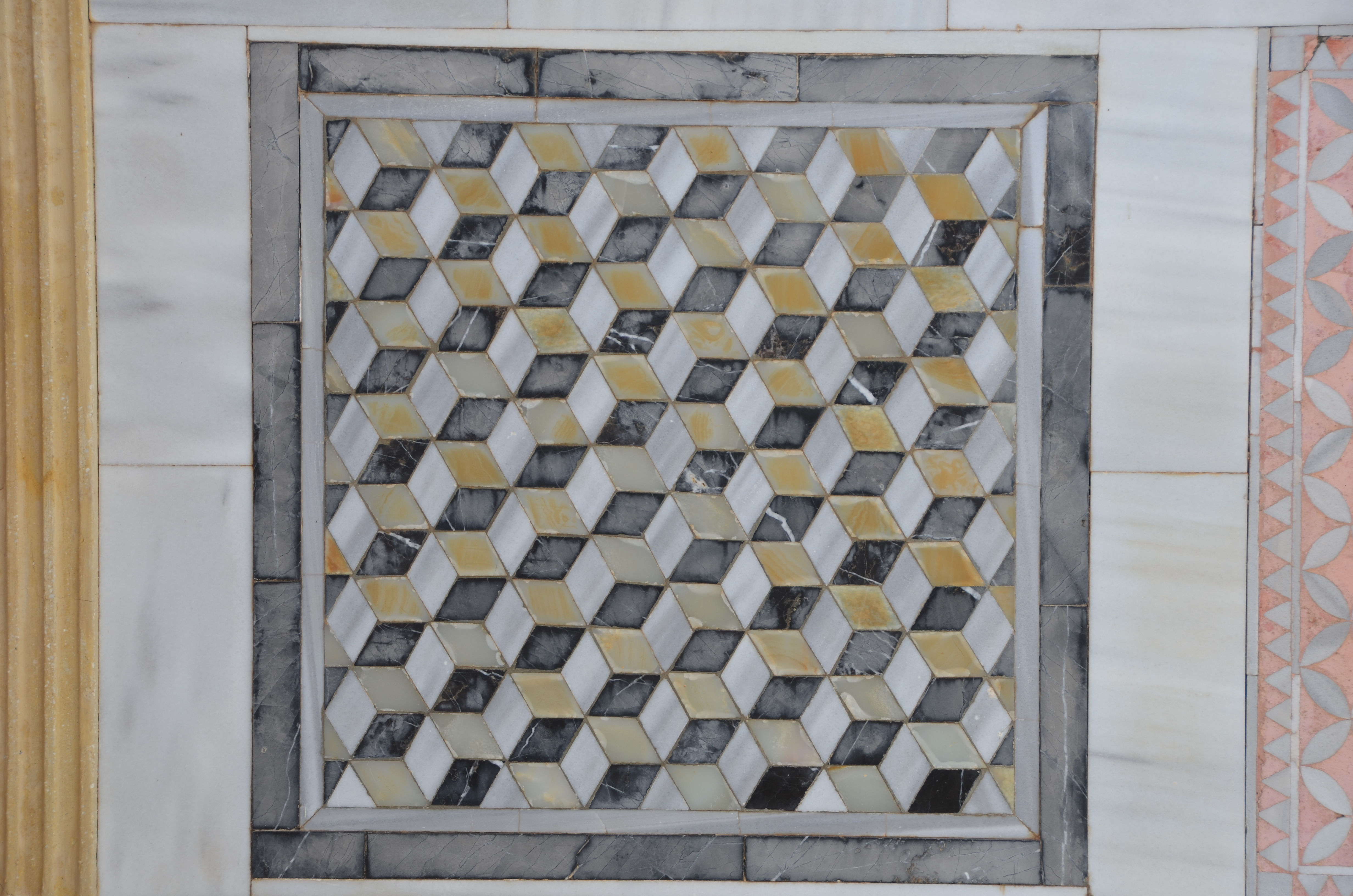 Sardes antik kentinden duvar seramiği - 3 boyut etkisi